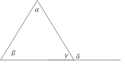 זוויות חיצוניות במשולש